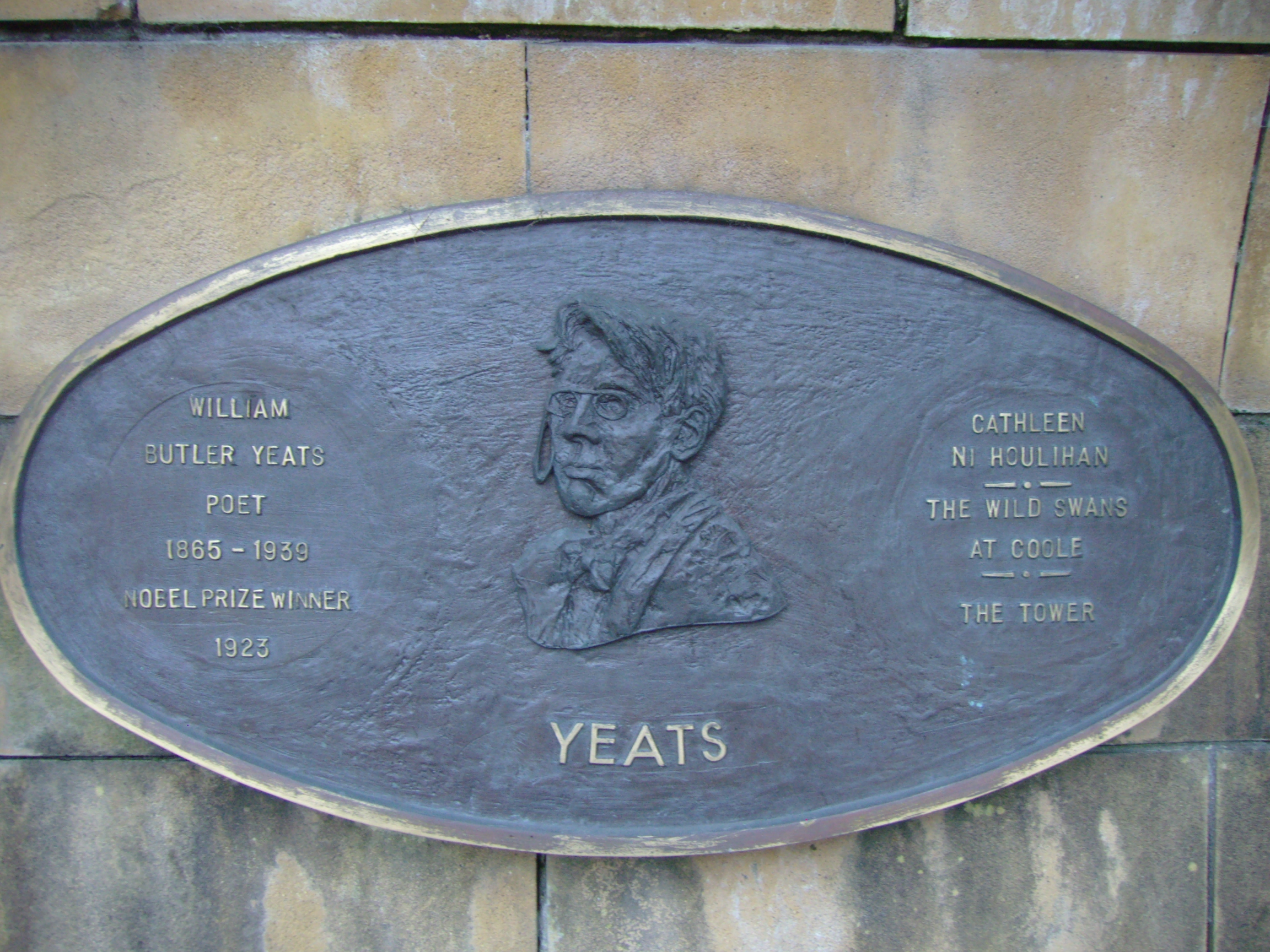 William Butler Yeats (1865–1939), irischer Dichter; Plakette im Saint Patrick's Park, Dublin, dort angebracht anlässlich der Dublin Millennium 988–1988 Literary Parade